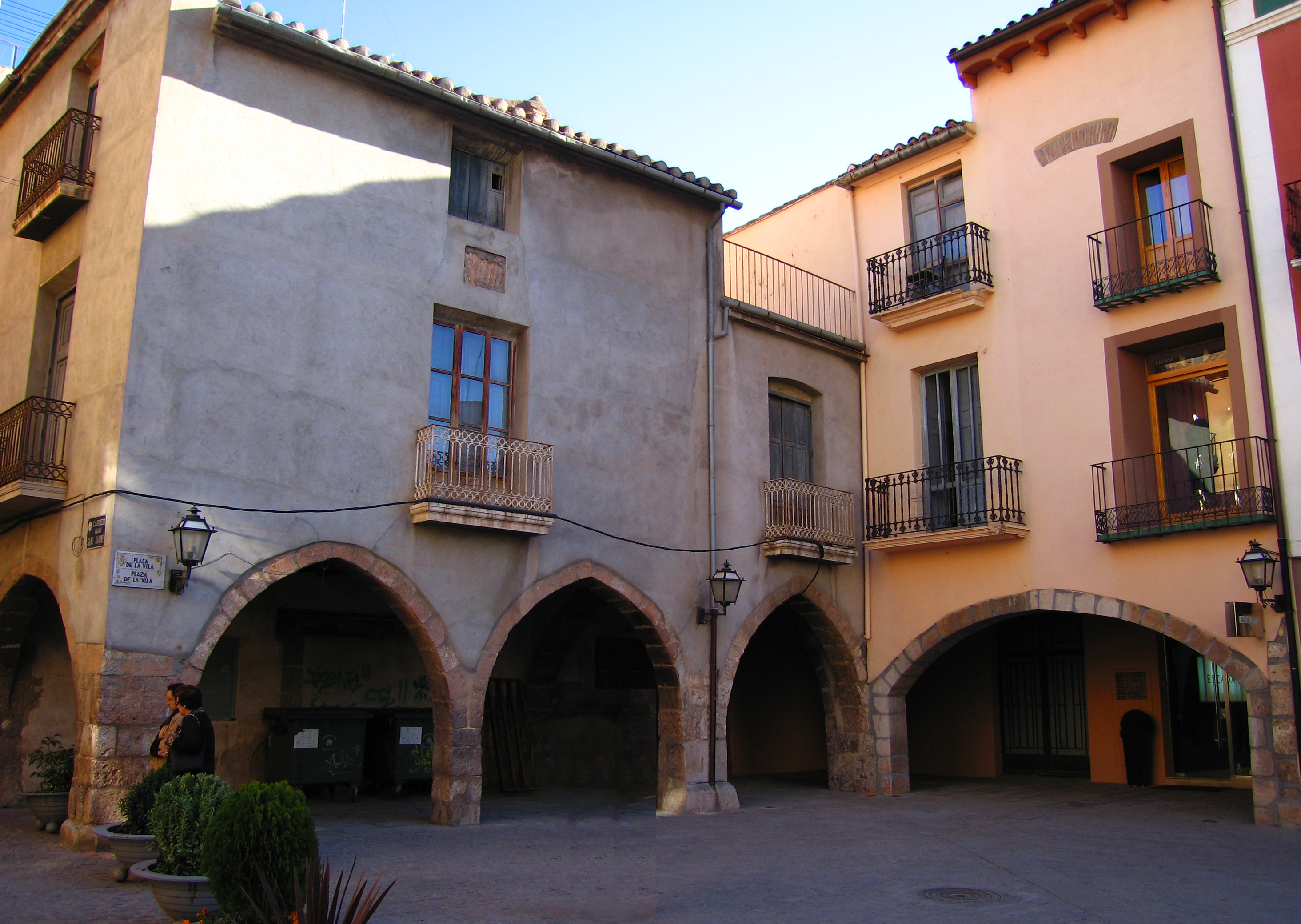 Plaça de la Vila a Vila-real